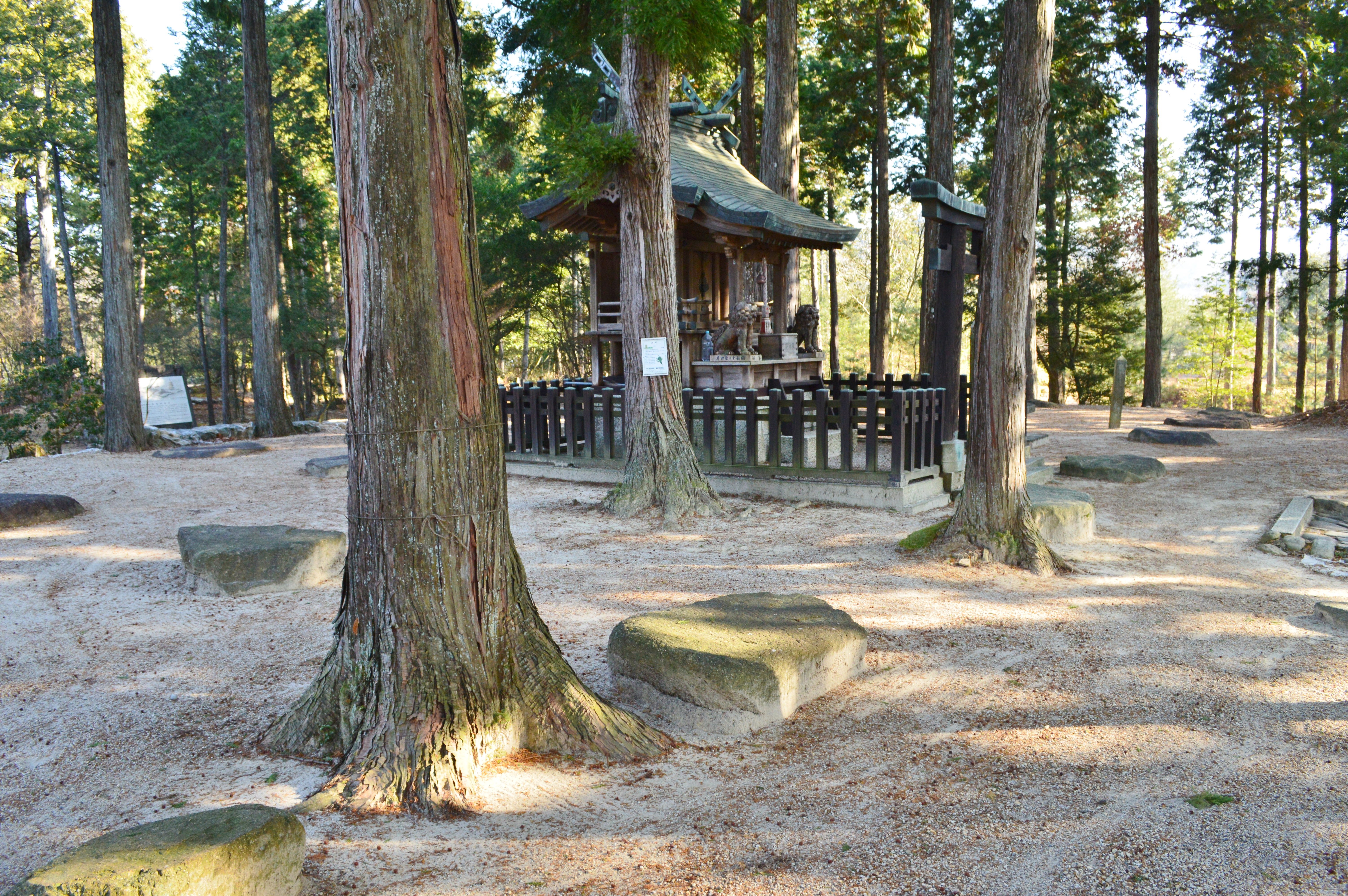 紫香楽宮跡内裏野地区 金堂跡